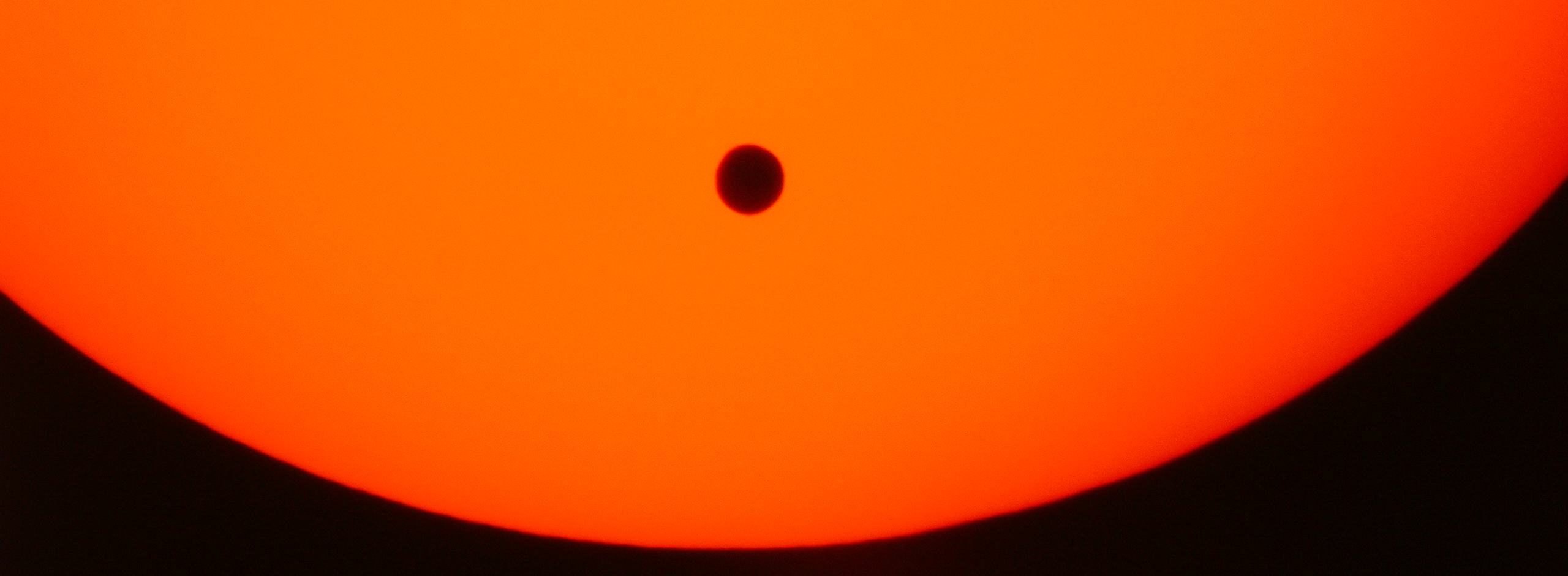 Venustransit am 08.06.2004 um 10:19 - Venus vollständig auf Sonnenscheibe Aufnahmemodalitäten: Standort: Jena (Thüringen), 50°57'36.1" N, 11°36'58.2" O Kamera: Digitalkamera Medion MD 41066 5,18 Megapixel (2560×1920), 3-fach Zoom eingestellt (entspricht Brennweite 111 mm), Blende 4,9 Teleskop: Schulfernrohr der DDR (Telementor), Objektivdurchmesser 63 mm, Objektivbrennweite 840 mm, Okularbrennweite 16 mm, somit Vergrößerung 52,5 x, Objektivsonnenfilter Belichtungszeit: 1/63 s